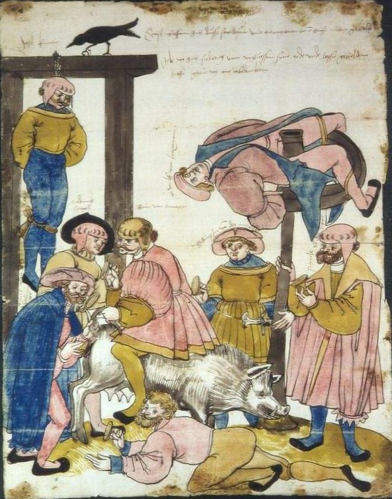 Schmähbrief mit Schandbild der Brüder von Gladbeck gegen Friedrich von Niehausen und dessen Bürgen, 1526